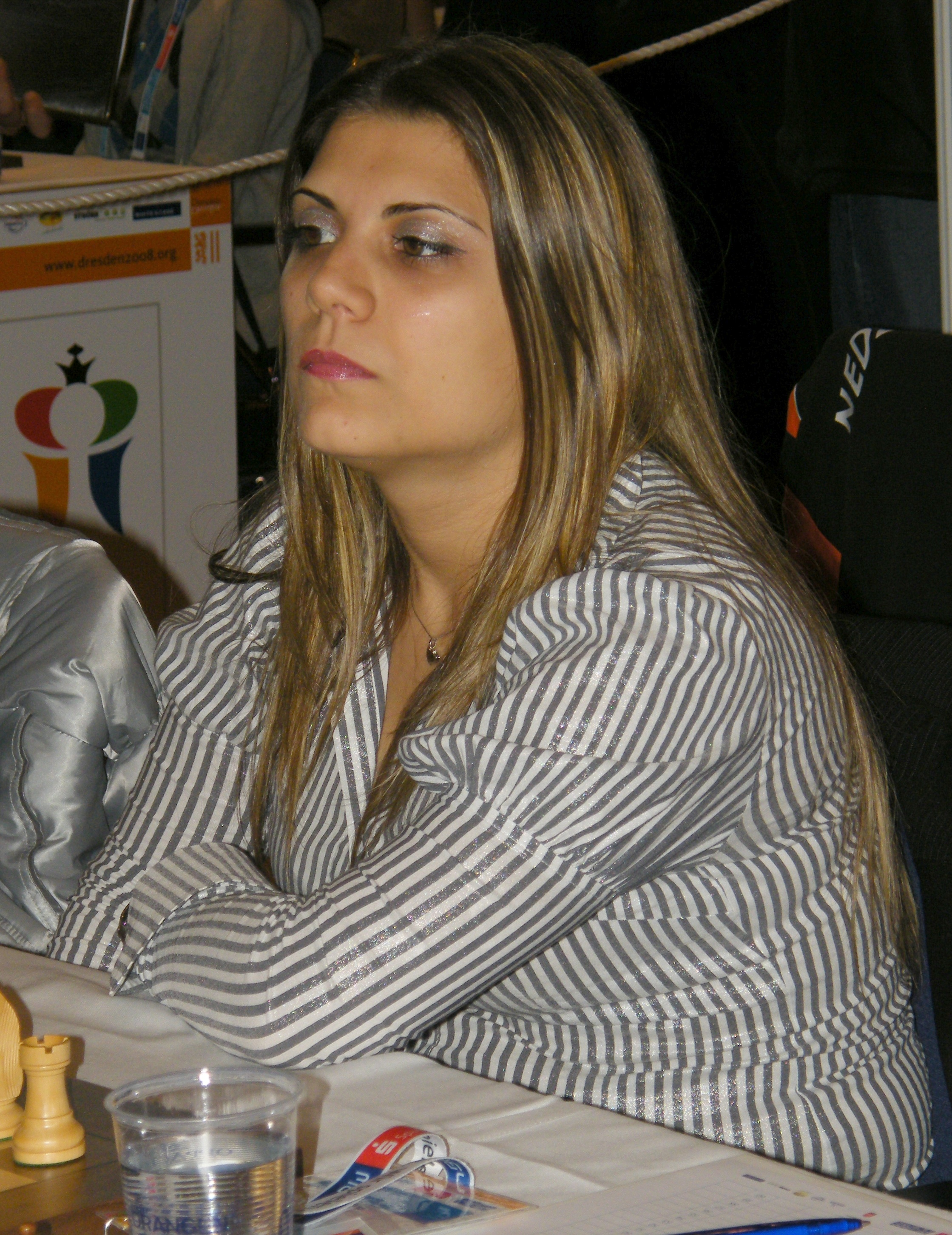 Nelly Aginjan bei der 38. Schacholympiade in Dresden 2008